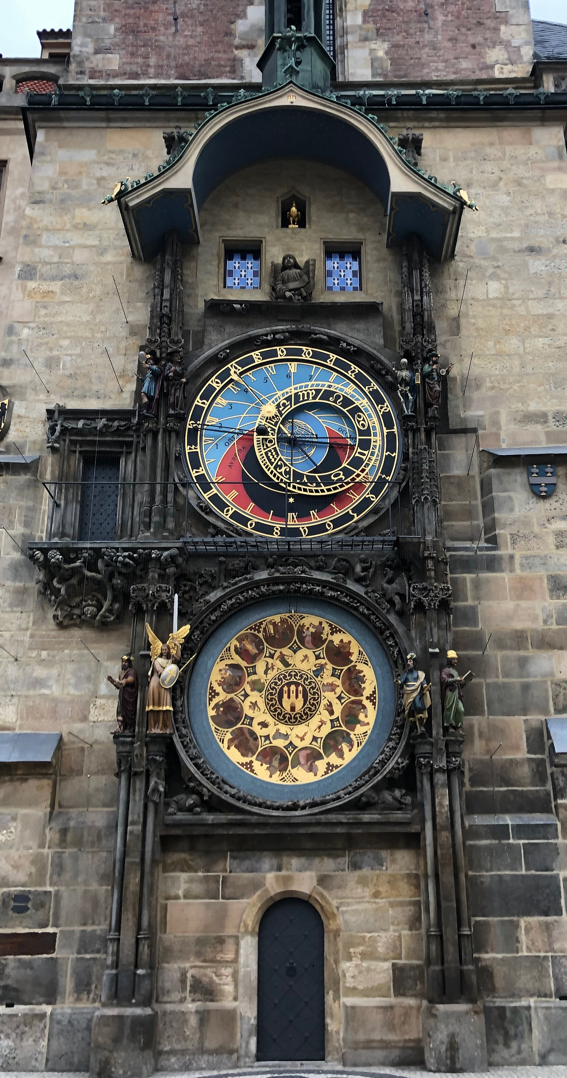 Старомнестская ратуша с астрономическими часами